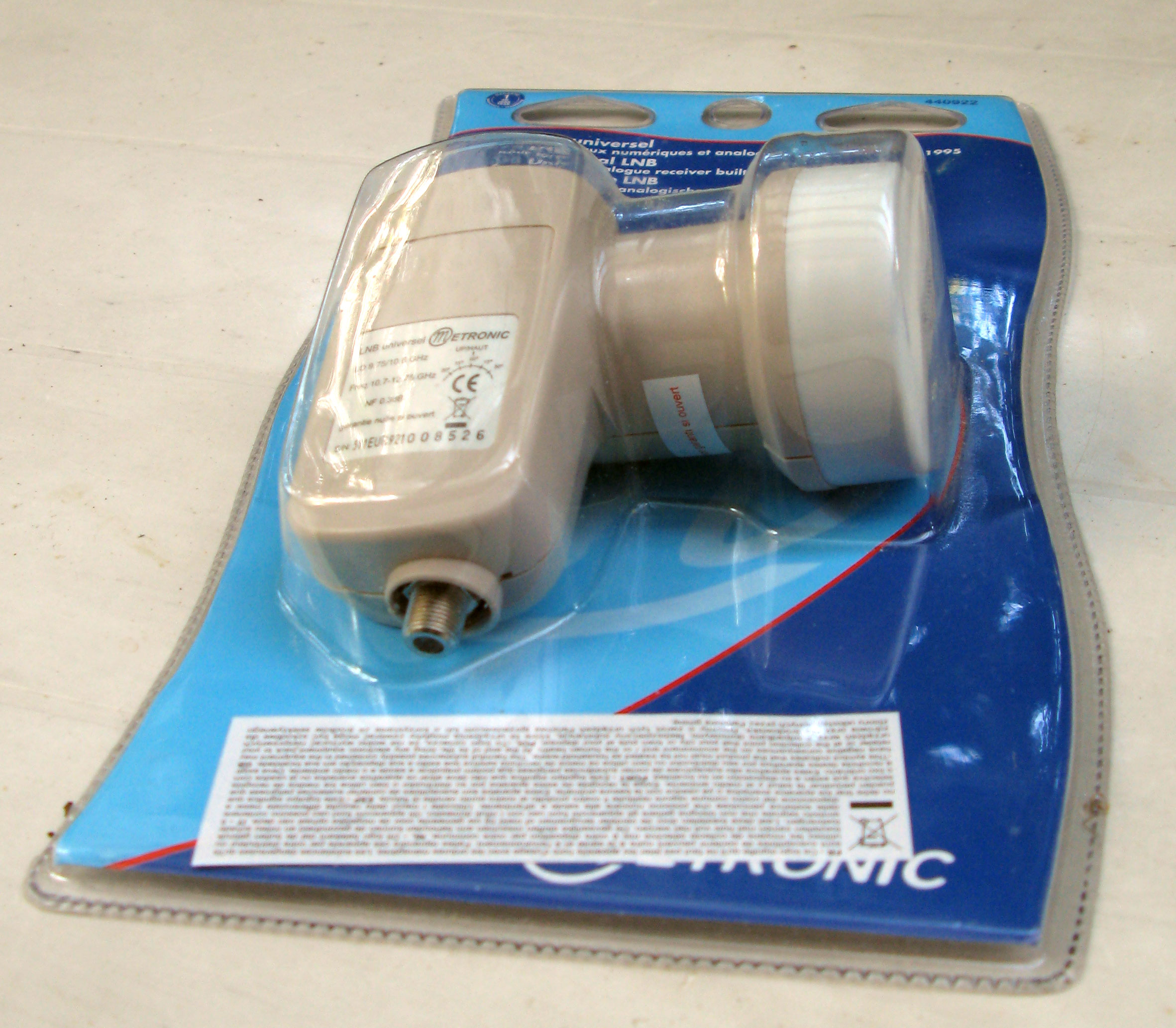 Blisterverpakung.